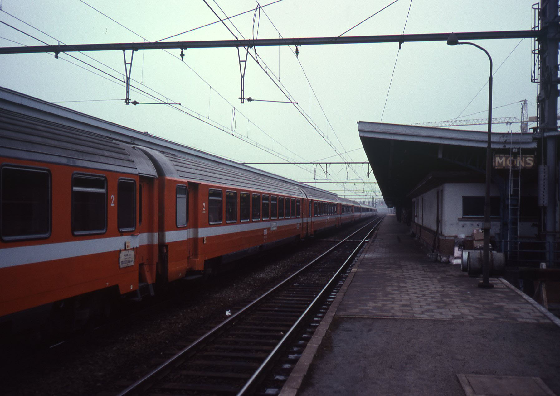 Een internationale Parijs Brussel getrokken trein in Bergen